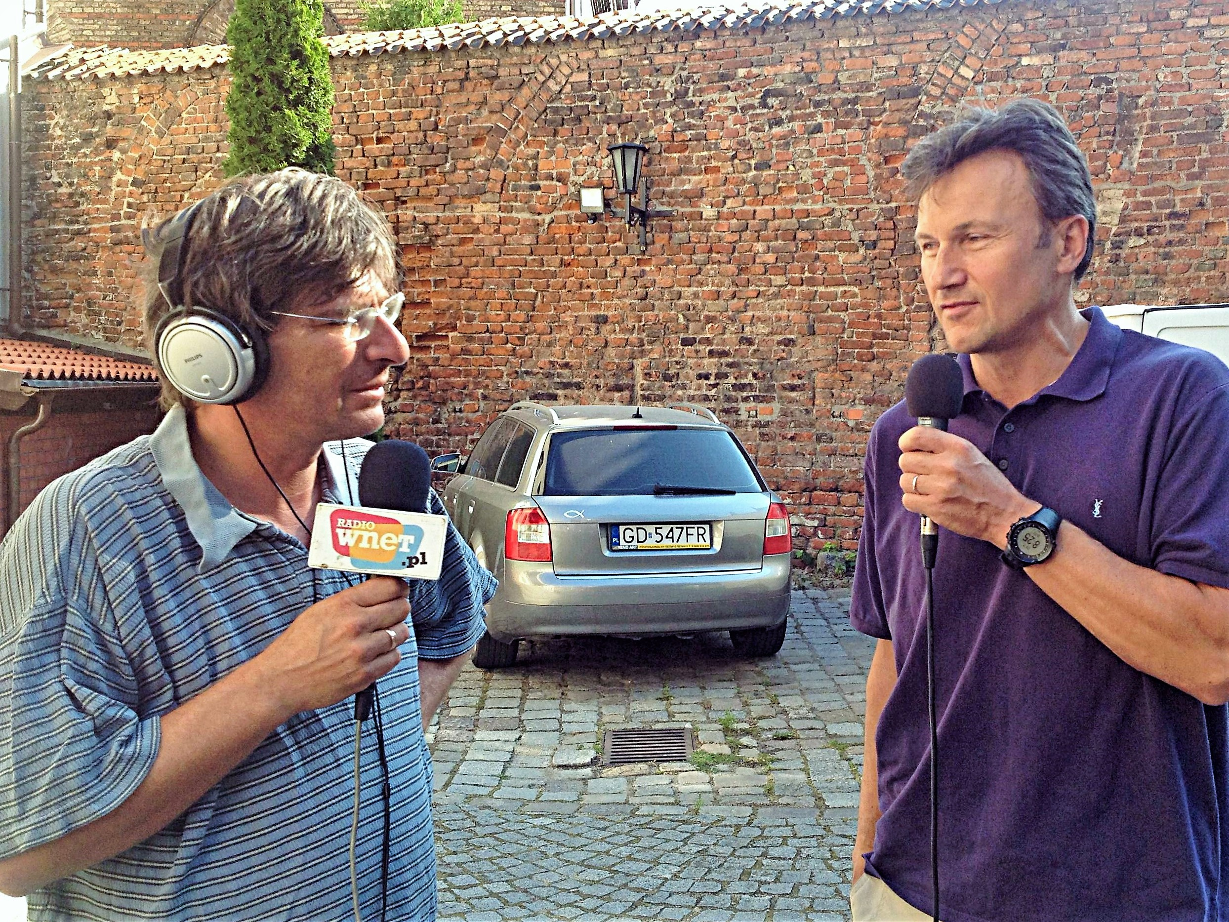 Radio Wnet w Gdańsku, Krzysztof Skowroński i Tomasz Tarnowski.